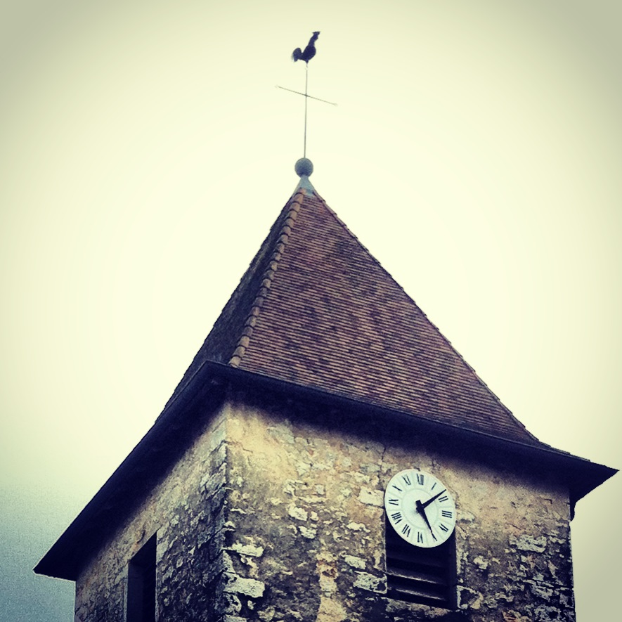 Vue du Clocher de l'Église Saint-Pierre de Chavannes-sur-Suran (01250)